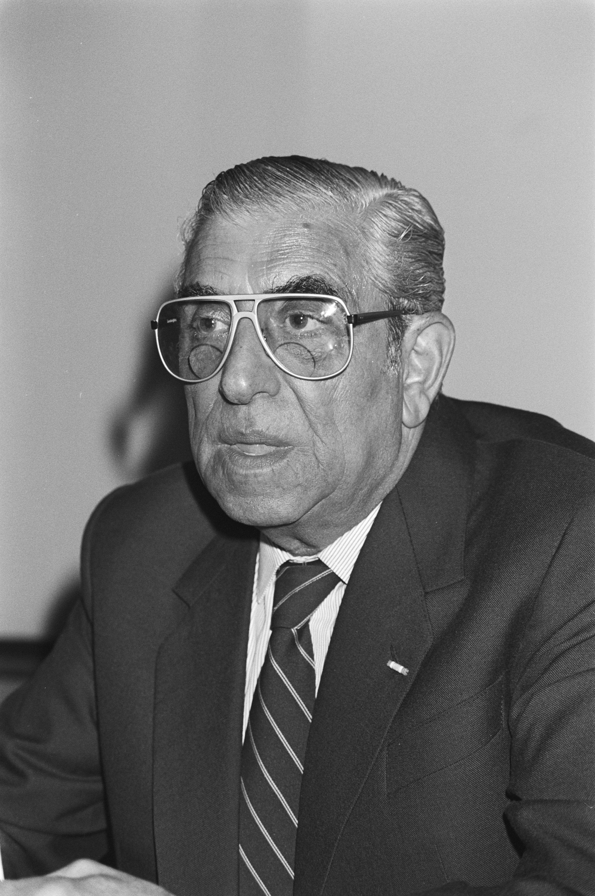 Collectie / Archief : Fotocollectie Anefo Reportage / Serie : Persconferentie door de bondscoach van het Nederlands voetbalelftal Beschrijving : Portret van Jaap van Praag tijdens een persconferentie Datum : 4 september 1981 Trefwoorden : portretten, sport, voetbal Persoonsnaam : Praag, Jaap van Fotograaf : Dijk, Hans van / Anefo, [onbekend] Auteursrechthebbende : Nationaal Archief Materiaalsoort : Negatief (zwart/wit) Nummer archiefinventaris : bekijk toegang 2.24.01.05 Bestanddeelnummer : 931-6608